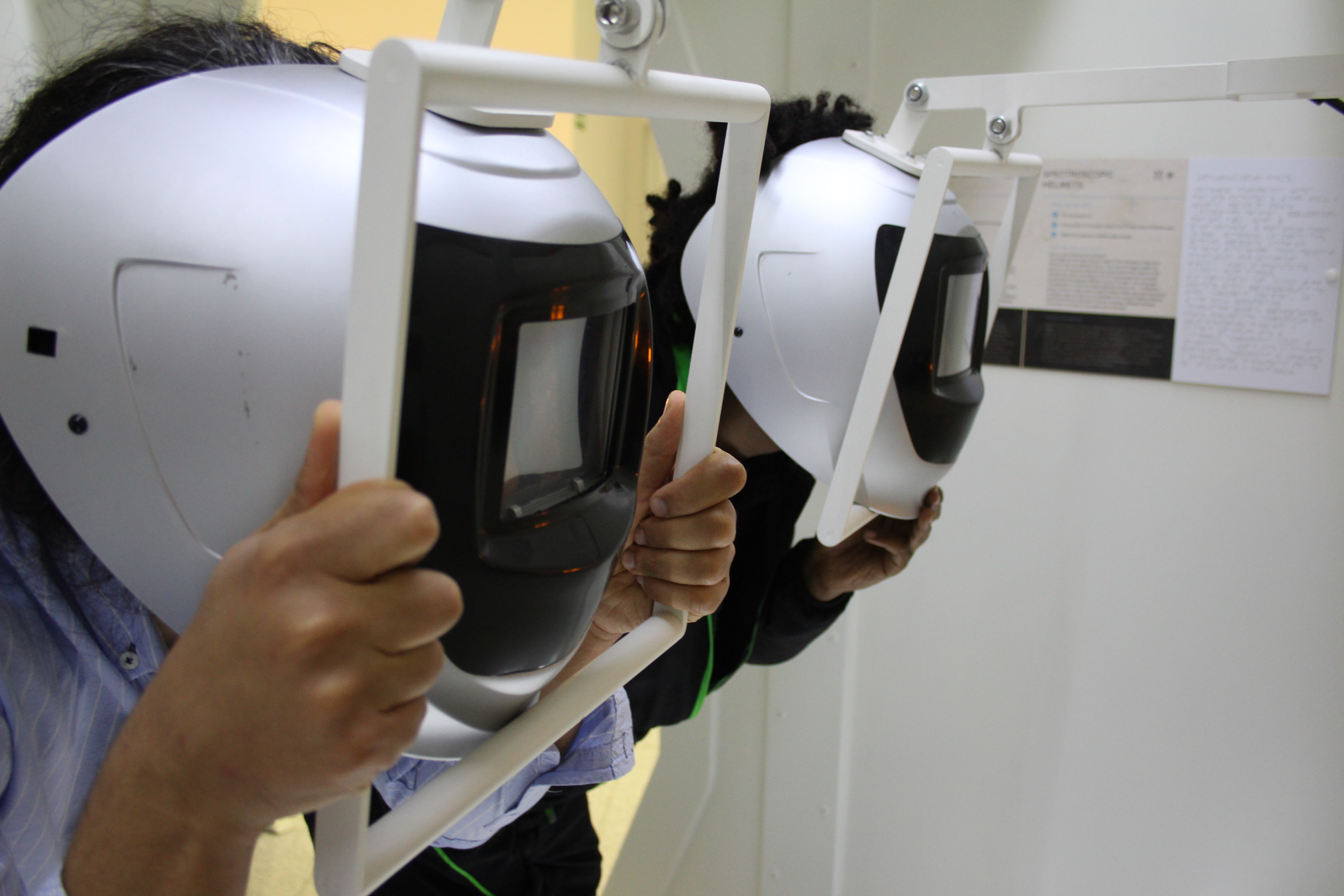 Wystawa stała "O obrotach"